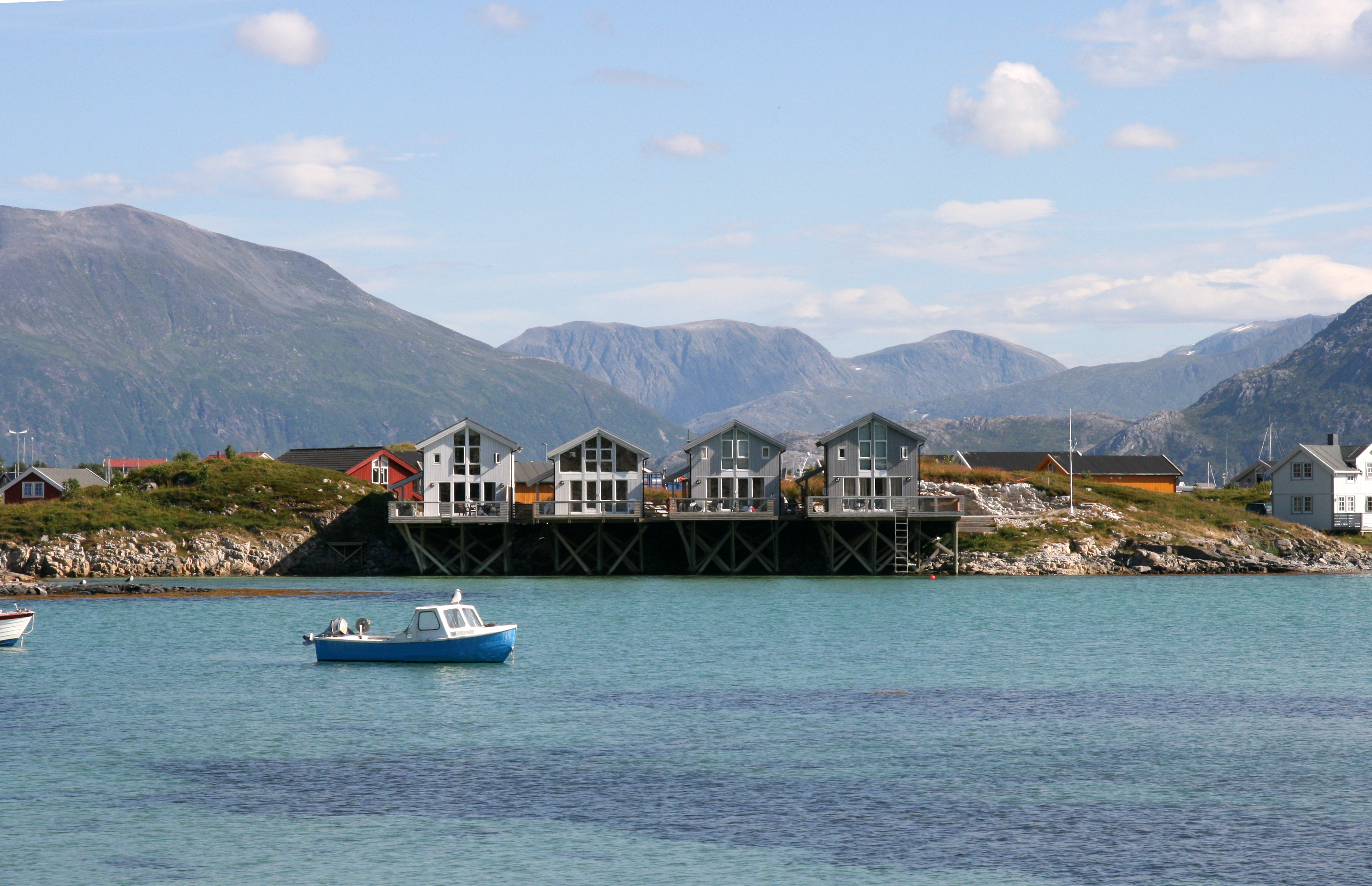 Naustbuer på Sommarøy i Troms.